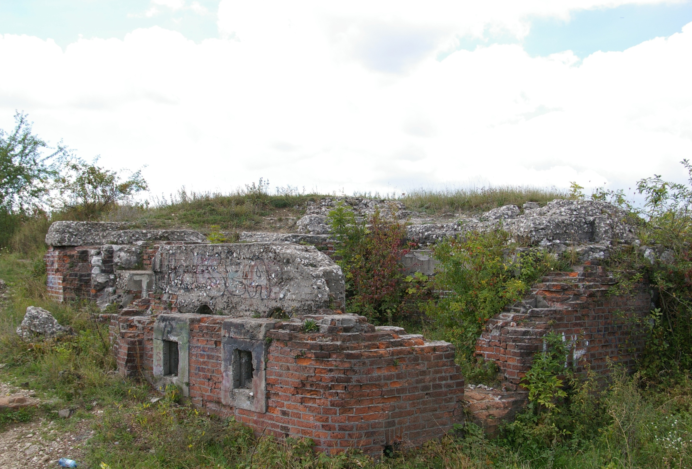 Fort 53 Bodzów, Kraków